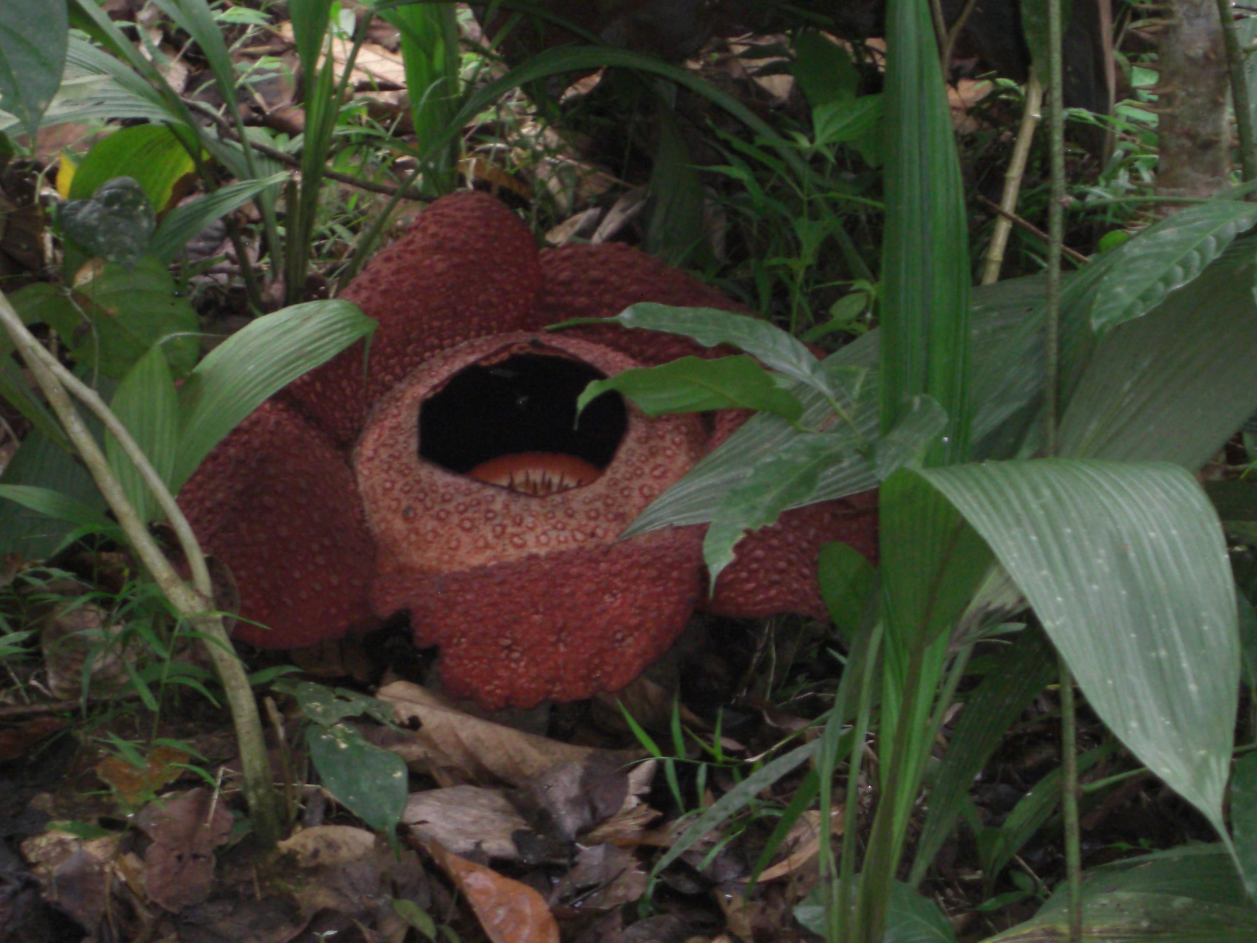 Rafflesia